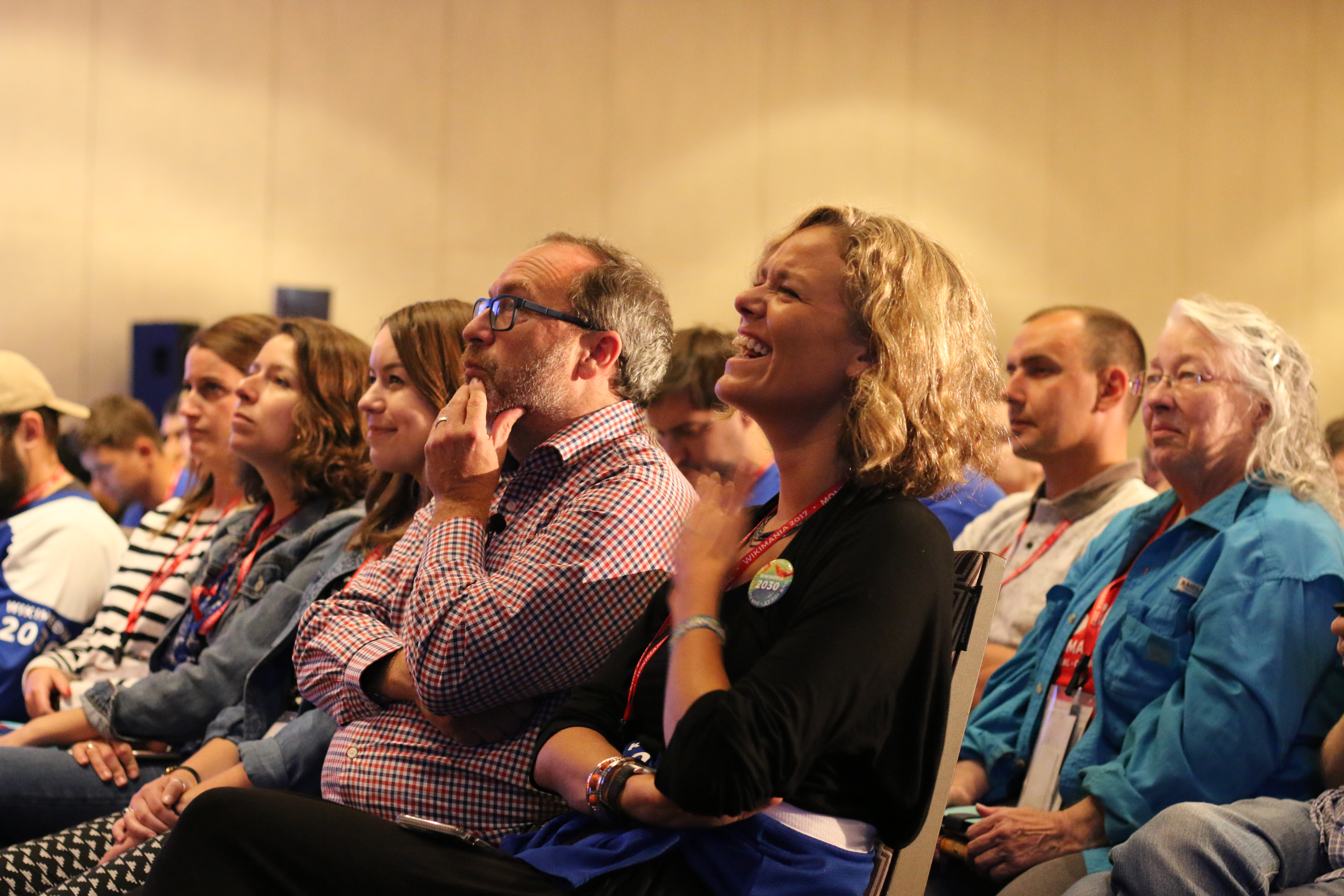 Closing ceremony of Wikimania 2017